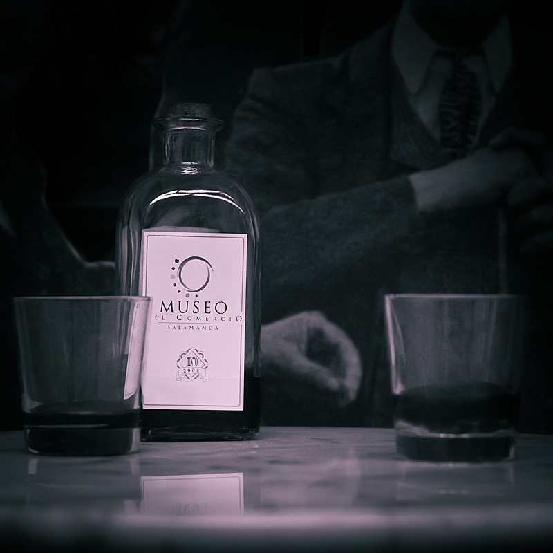 Detalle de una de las salas donde se expone una recreación de un bar en la Salamanca del siglo pasado.Se trata de uno de los establecimientos que se ubicaron dentro el Mercado Central de Abastos durante la Exposición Regional en 1907. El establecimiento de la foto es el stand de "La Mallorquina", una conocida confitería. Museo del Comercio y la Industria Native nameMuseo del Comercio y la Industria (Salamanca)LocationSalamanca, (Spain)Coordinates40° 57′ 54.29″ N, 5° 39′ 14.79″ W Established2006Web page control : Q6034415 VIAF: 169904596 BNE: XX4875307 institution QS:P195,Q6034415